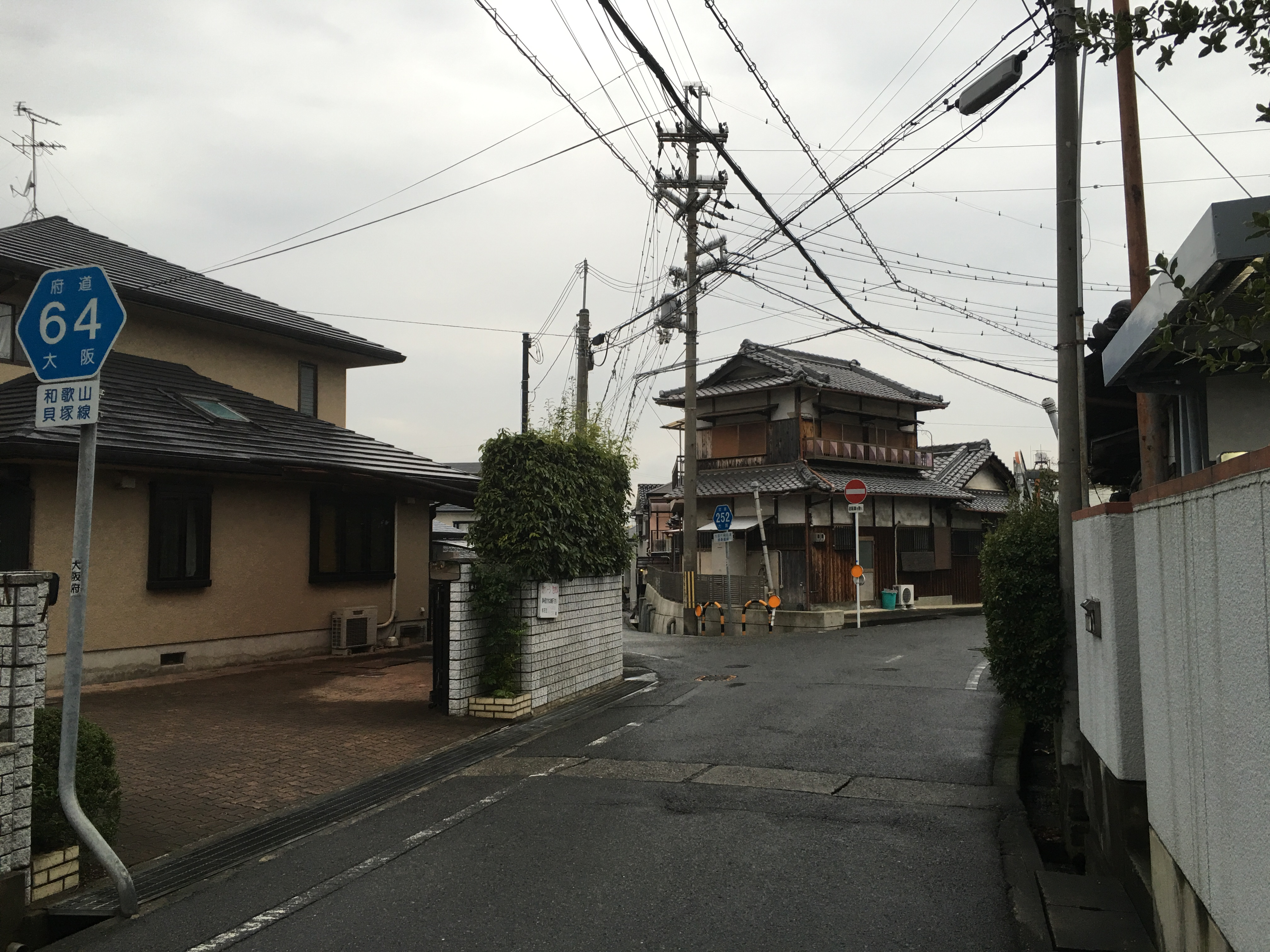 和歌山県道・大阪府道64号和歌山貝塚線、大阪府道252号との交差地点